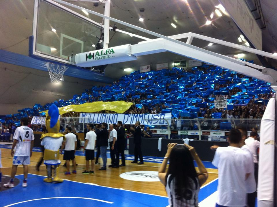 Coreografia gradinata PalaFantozzi in gara3 finale Adecco Gold: Orlandina-Trento